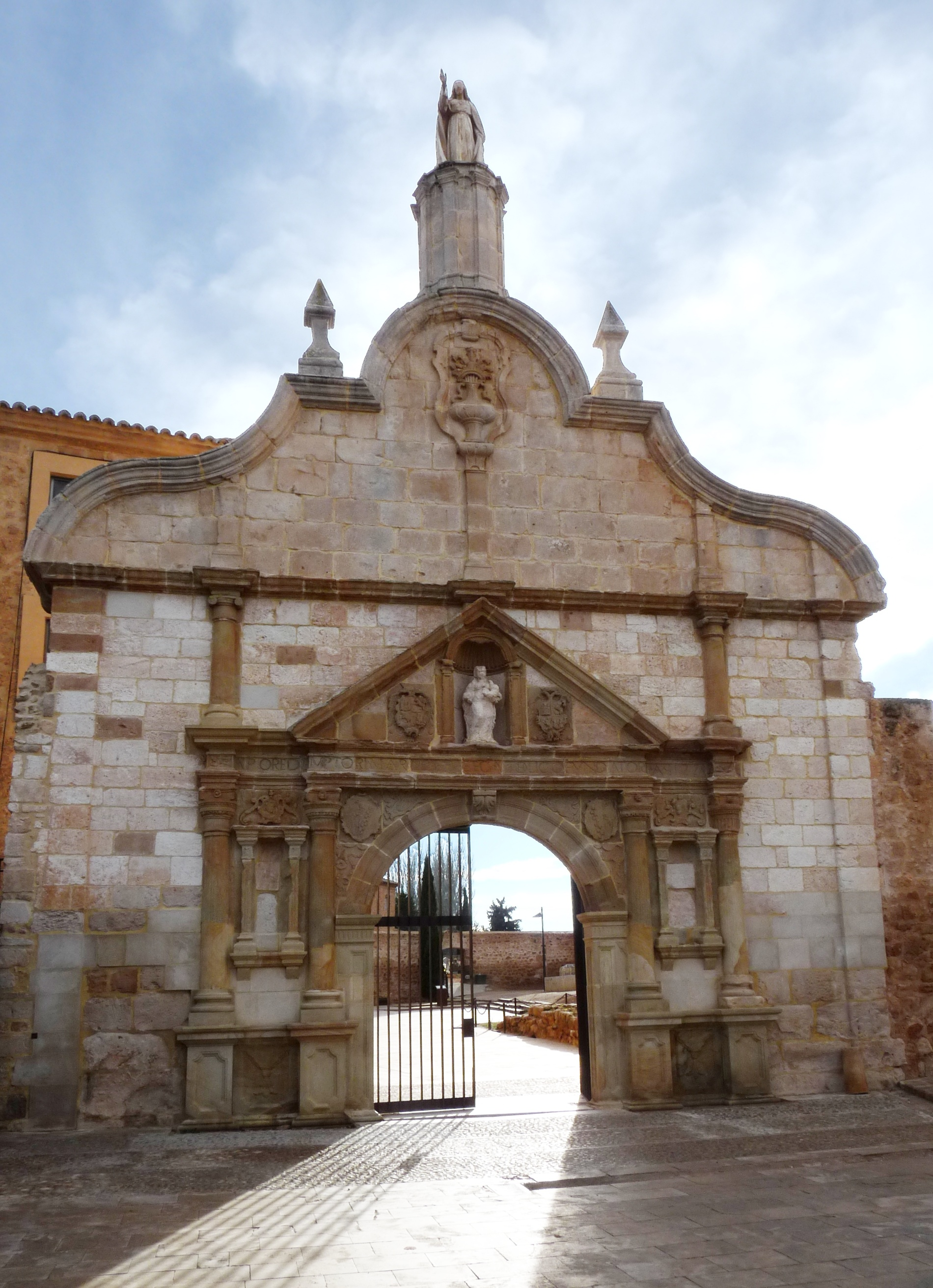 Monaterio de Santa María de Huerta - Portada s. XVI (parte inferior), 1785 (frontón superior) - Texto: CHRISTO REDEMPTORI MARIAE DEIPARAE ET CATHOLICO FUNDATORI A.1177